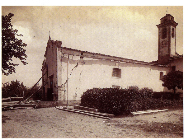 Danni alla chiesa di San Martino a Strada dopo il terremoto di Firenze del 1895